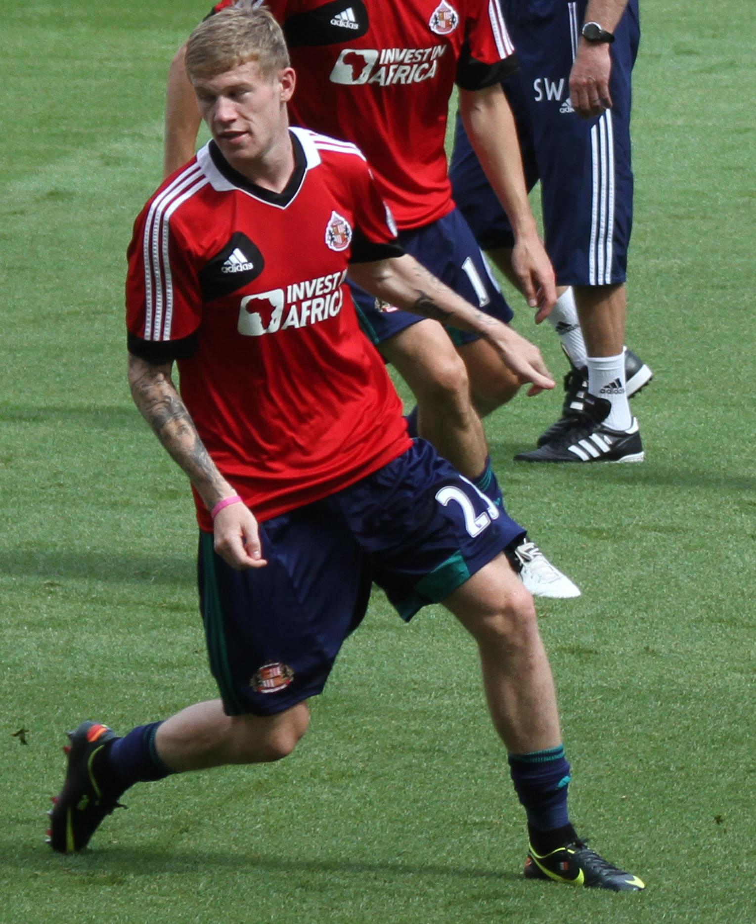 Sunderland Warm Up 1